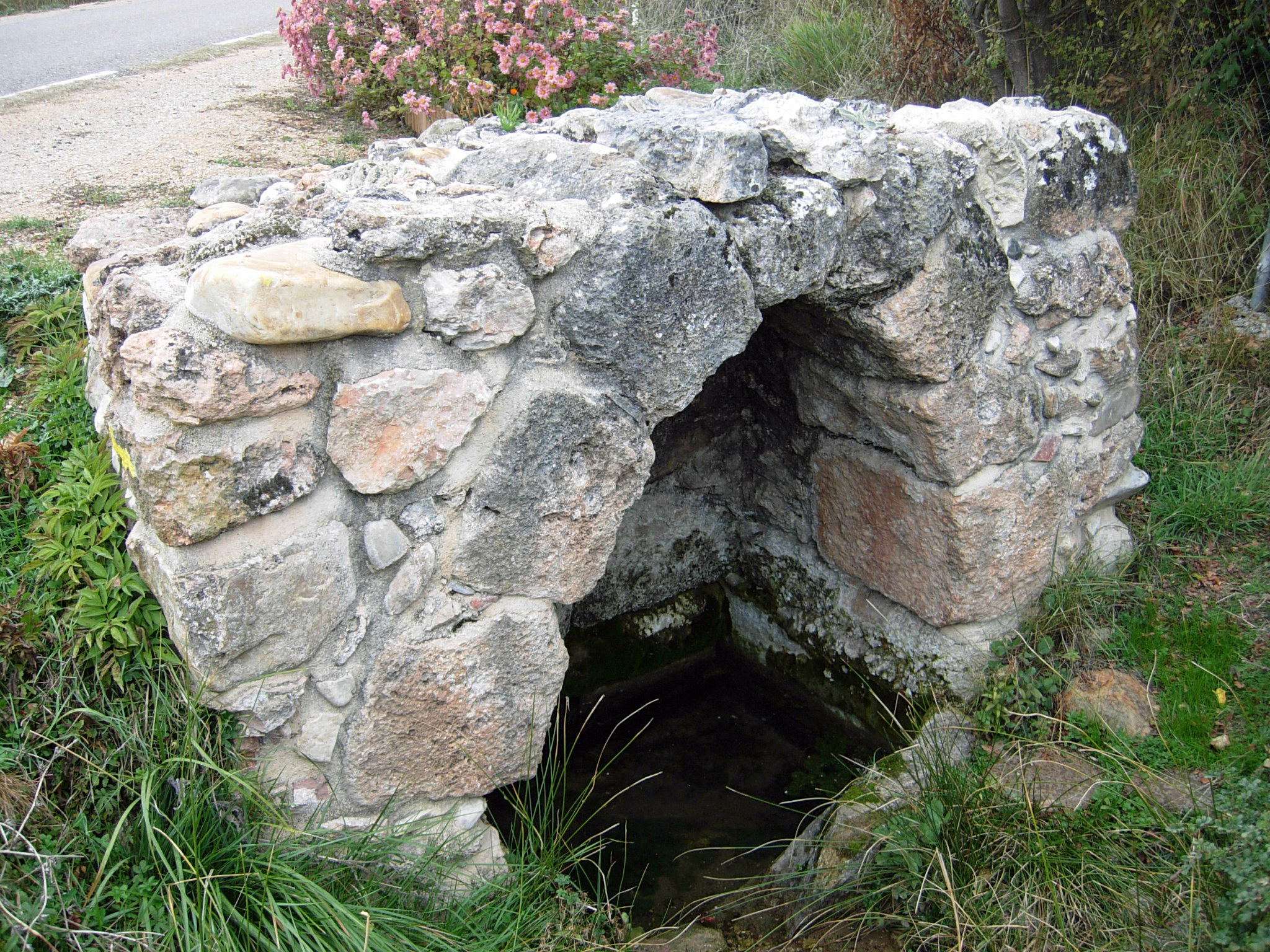 Fuente visigoda en Huérmeces del Cerro